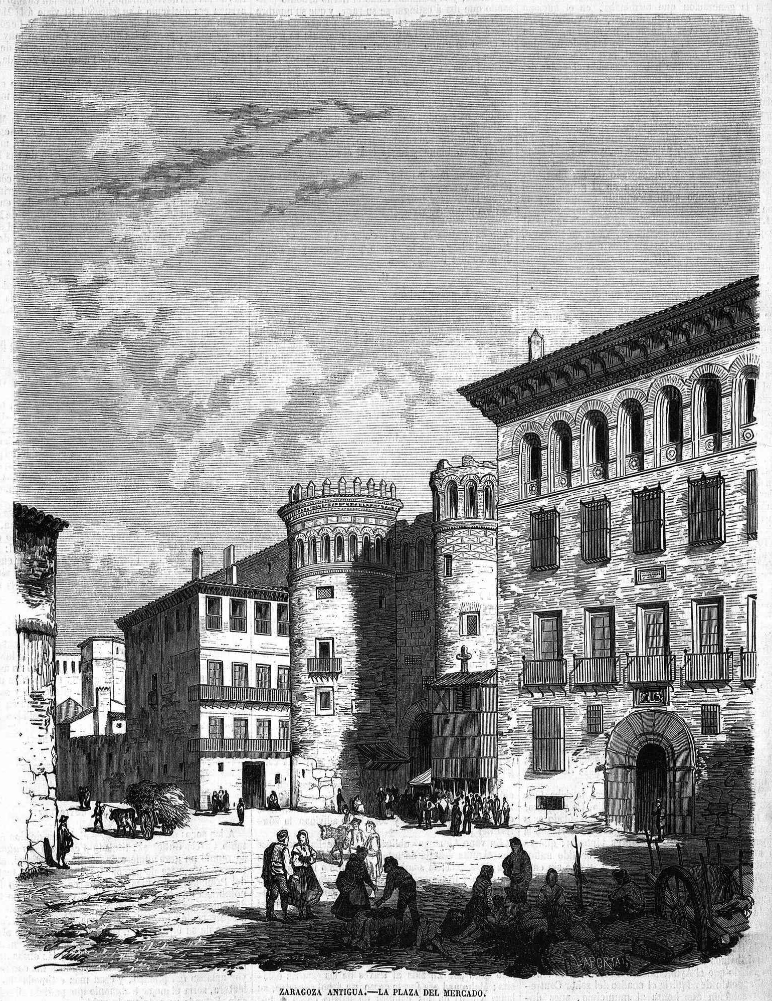 Zaragoza antigua, plaza del Mercado, en la revista española El Museo Universal.